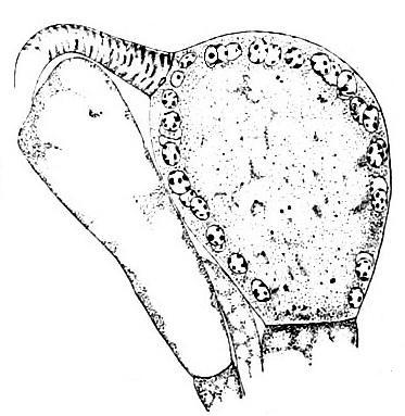 Pyronema omphalodes de Handbuch der Systematischen Botanik (1924)